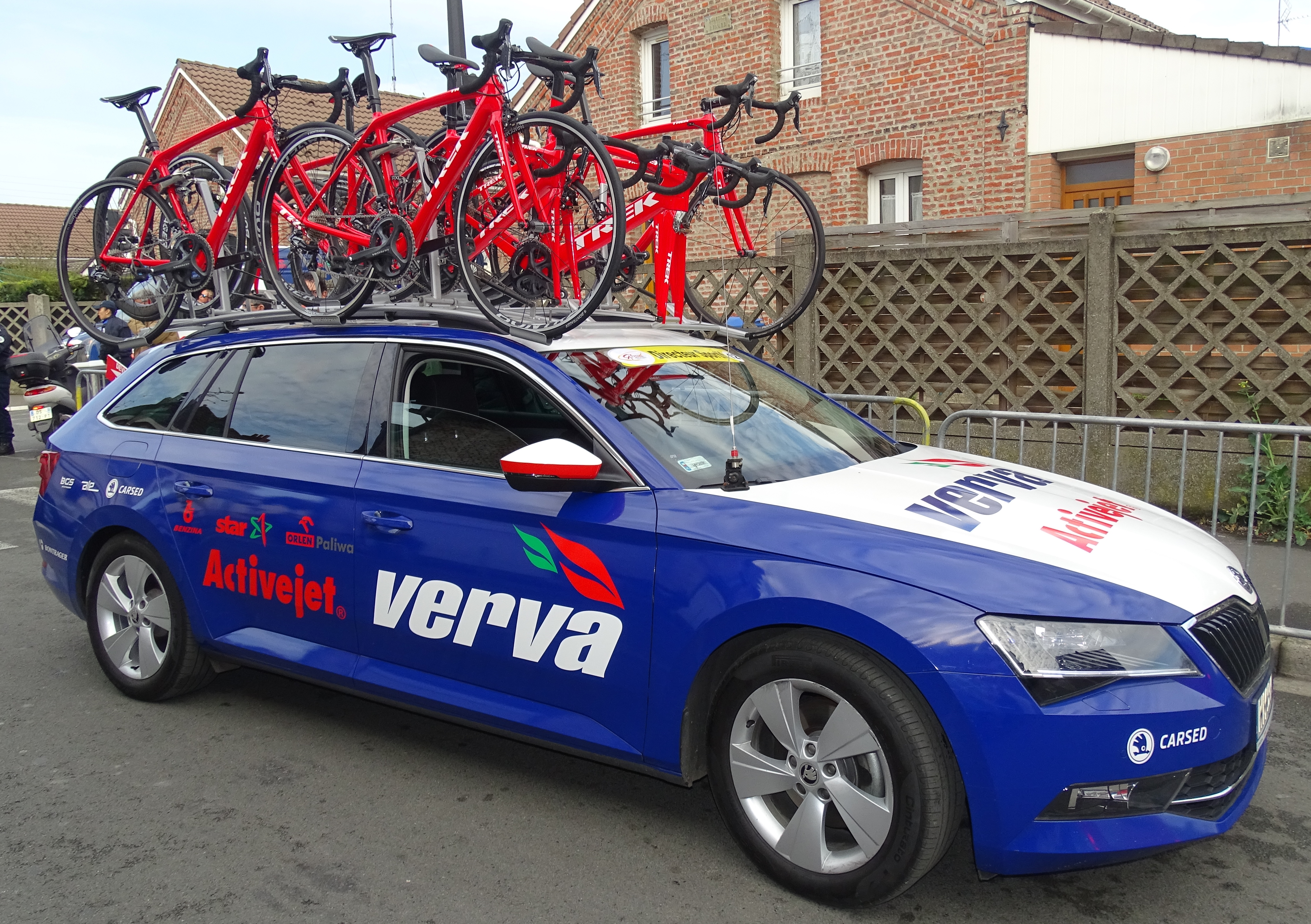 Reportage réalisé le jeudi 14 avril à l'occasion du départ et de l'arrivée du Grand Prix de Denain 2016 à Denain, Nord, Nord-Pas-de-Calais-Picardie, France.